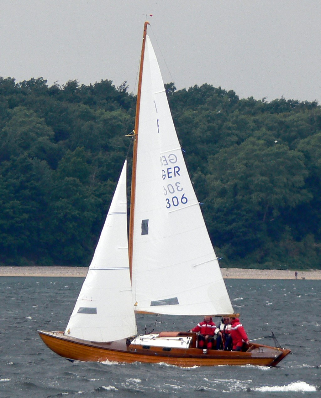 Segelboot der Bootsklasse Folkeboot bei einer Regatta vor Laboe.